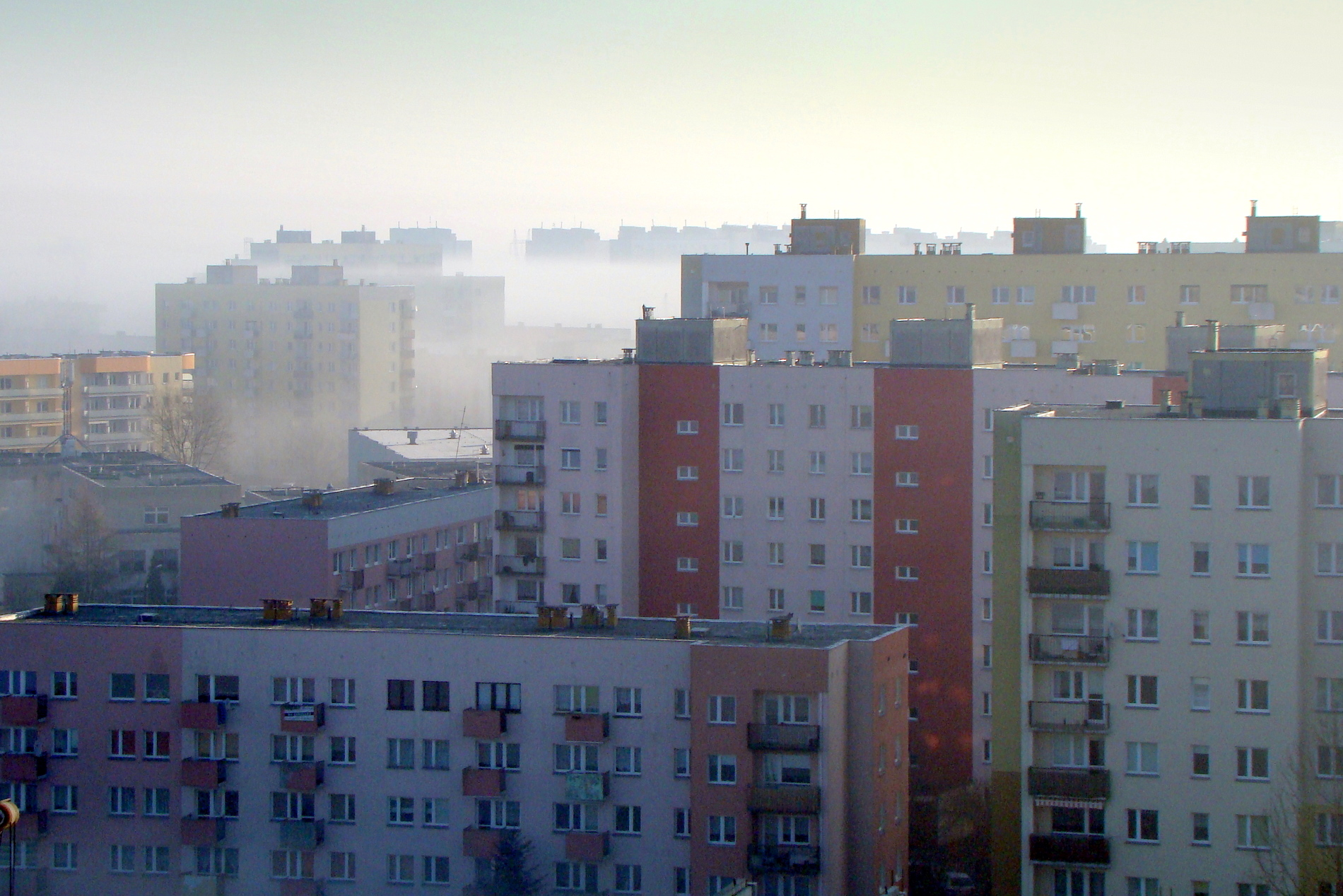 Gorzów Wlkp., dzielnica Górczyn. Widok na budynki między ulicami Armii Ludowej a Szarych Szeregów w mglisty poranek.